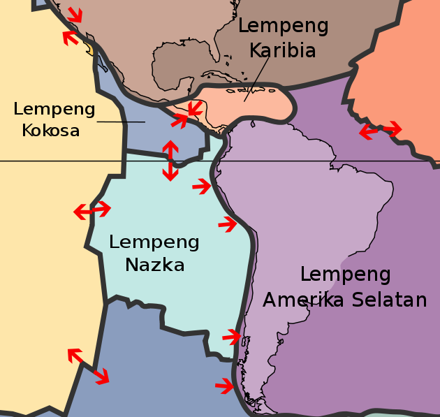 Beberapa kumpulan lempeng di sekitar Benua Amerika Selatan.